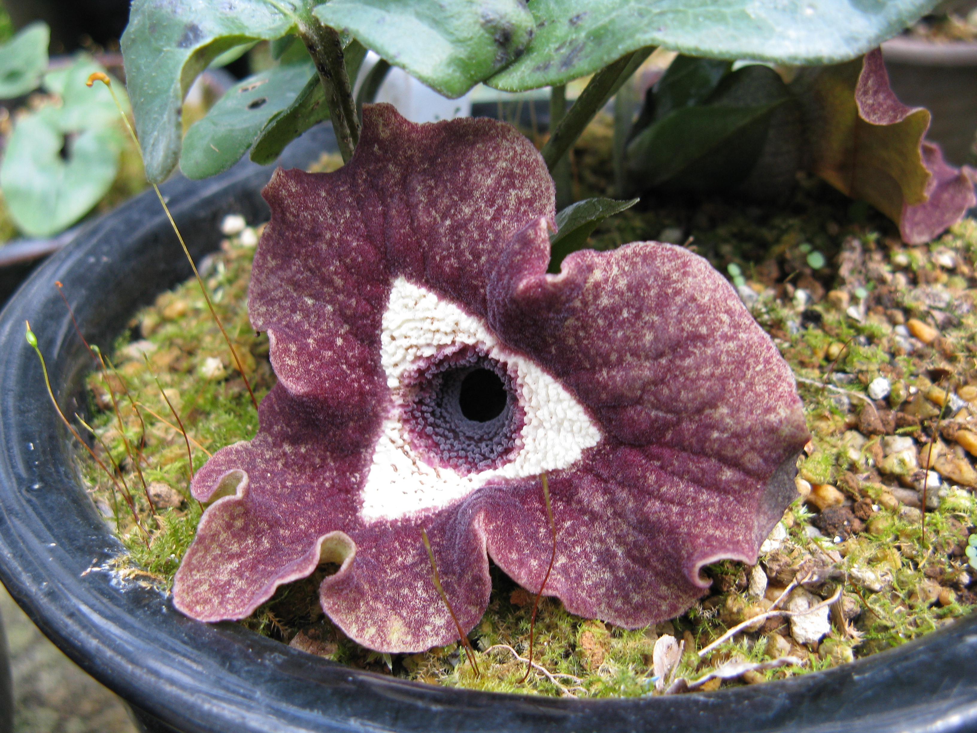 Asarum delavayi Place:Osaka Prefectural Flower Garden,Osaka,Japan